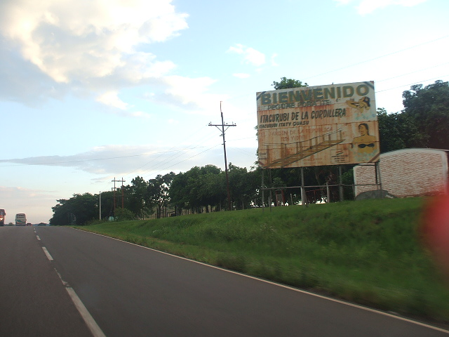 Entrada a Itacurubí